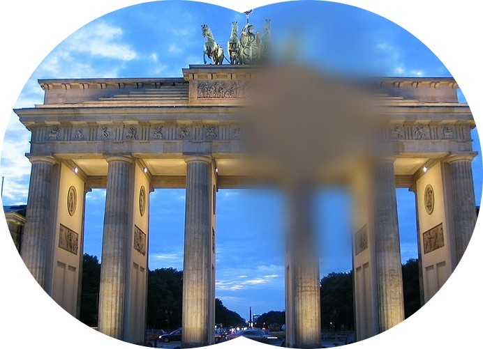 Negatives Skotom, Wahrnehmungsstörung während einer Migräneaura. Bei einem negativen Skotom gehen Strukturen und Kontraste verloren.